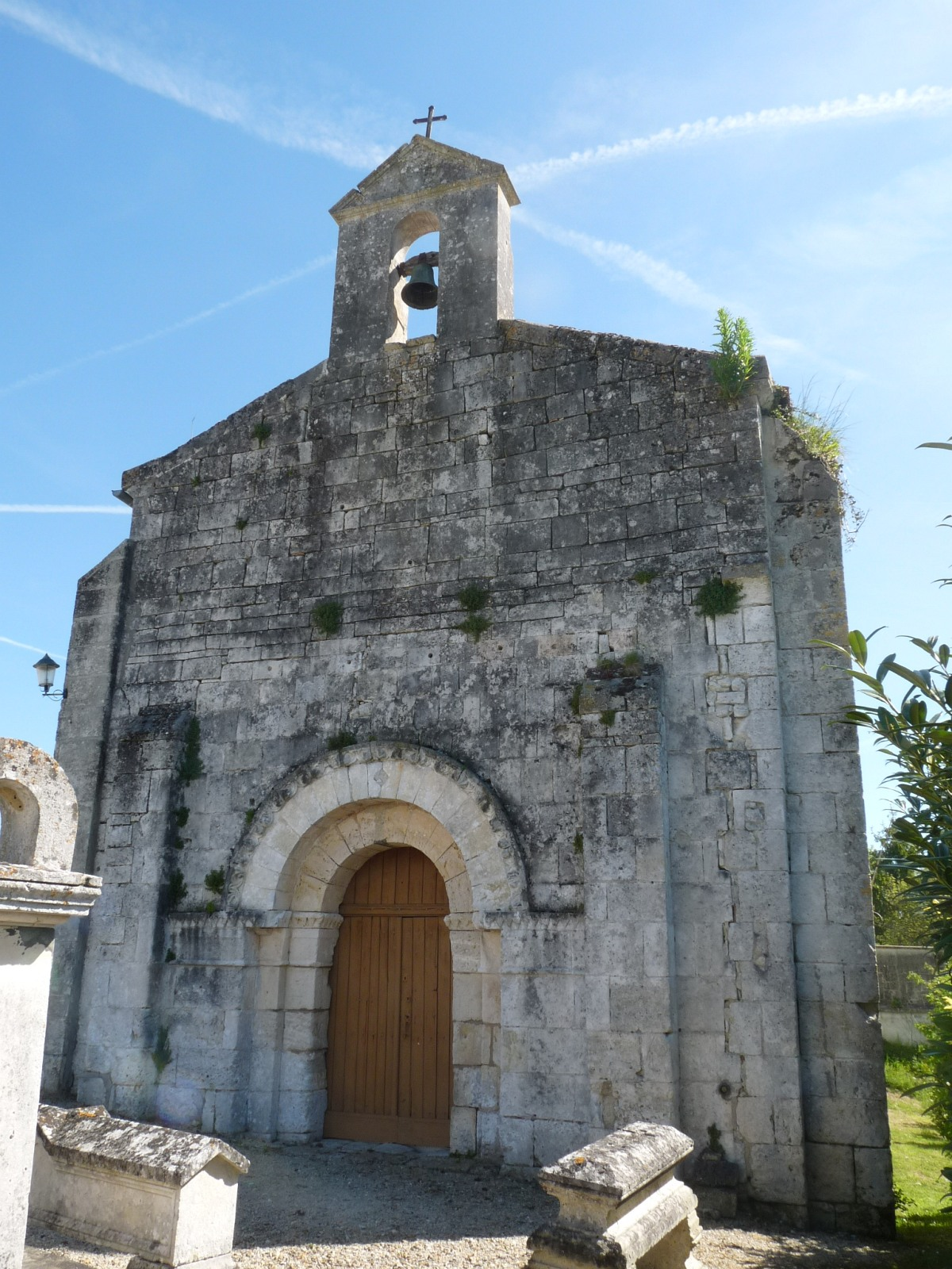 Eglise de Viville, Charente, France